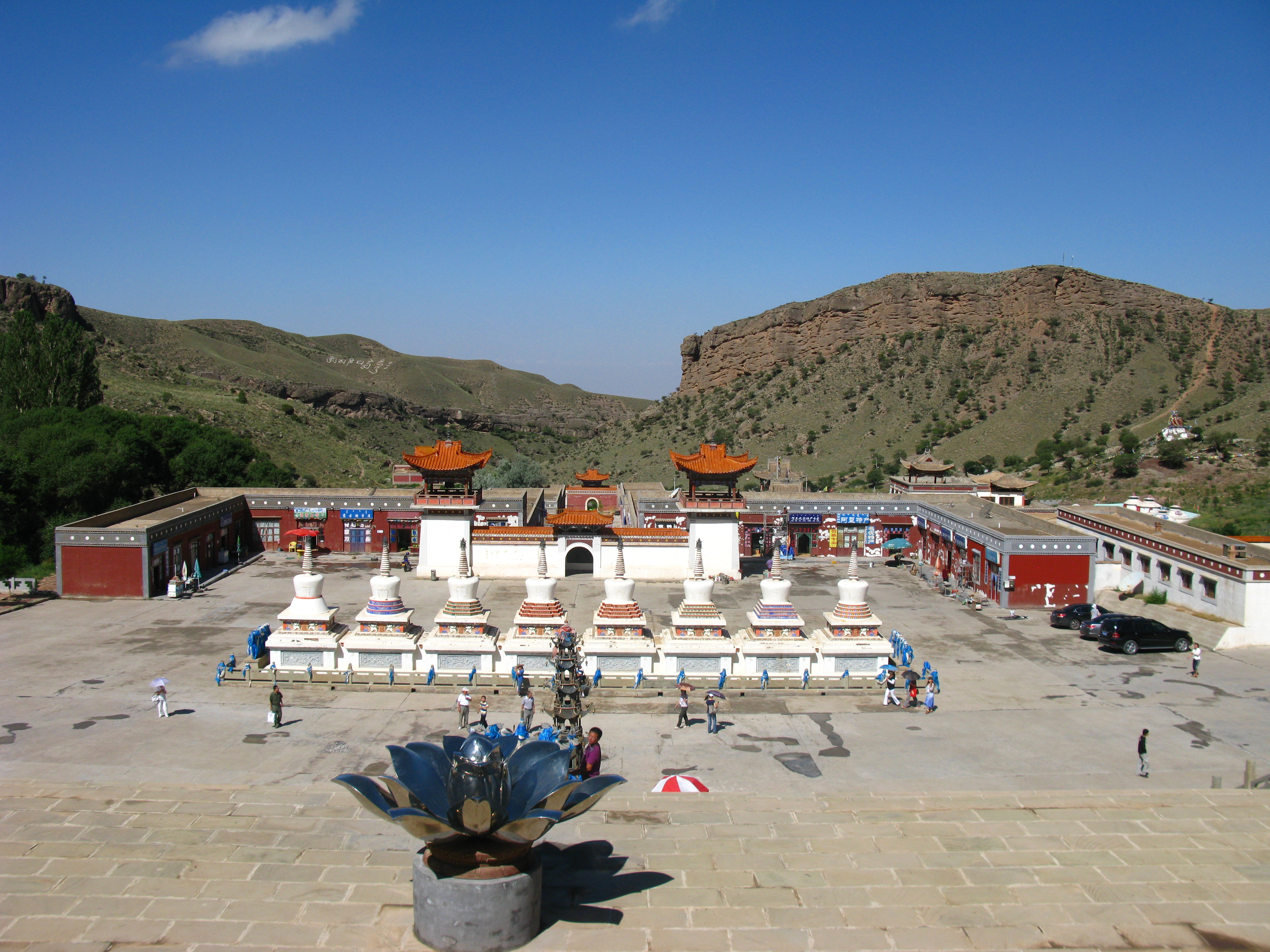 Nan Si